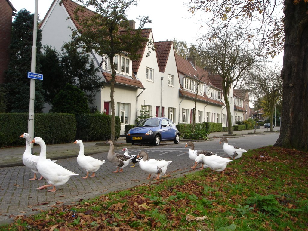 The Langegeer in the deelgemeente Feijenoord, district Vreewijk in Rotterdam, the Netherlands.